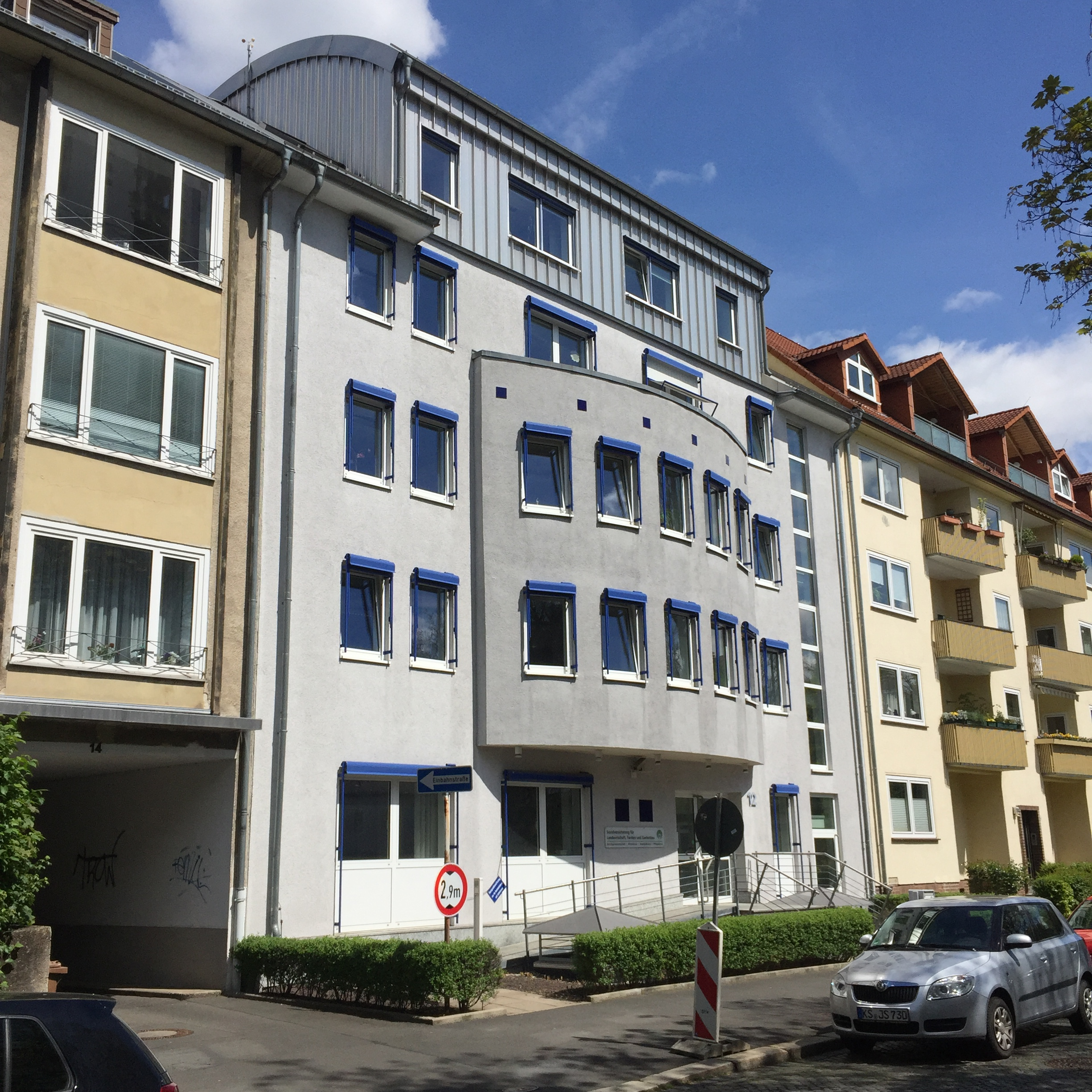 Verwaltungsgebäude SVLFG Kassel Luisenstrasse